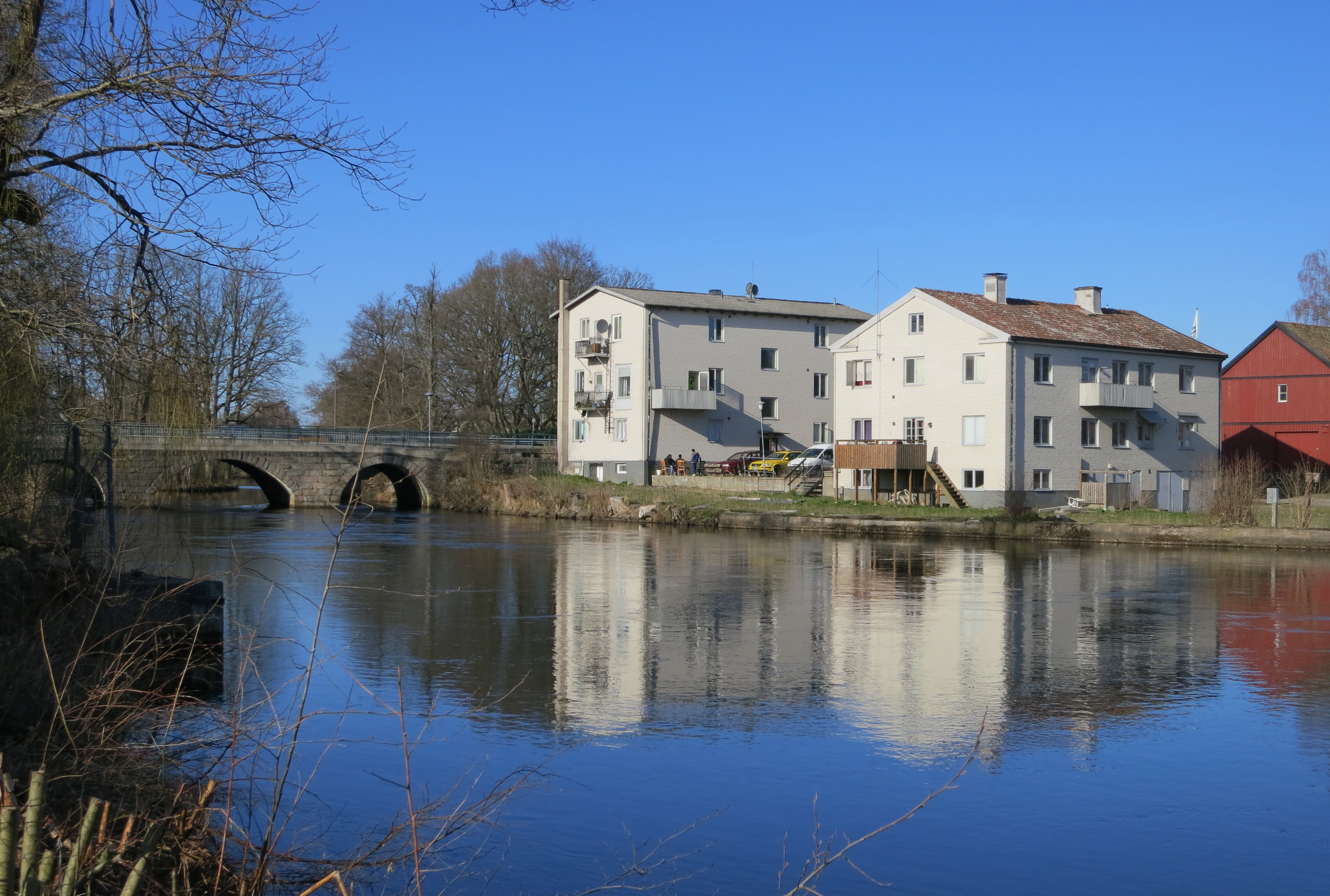 Helge å i Knislinge